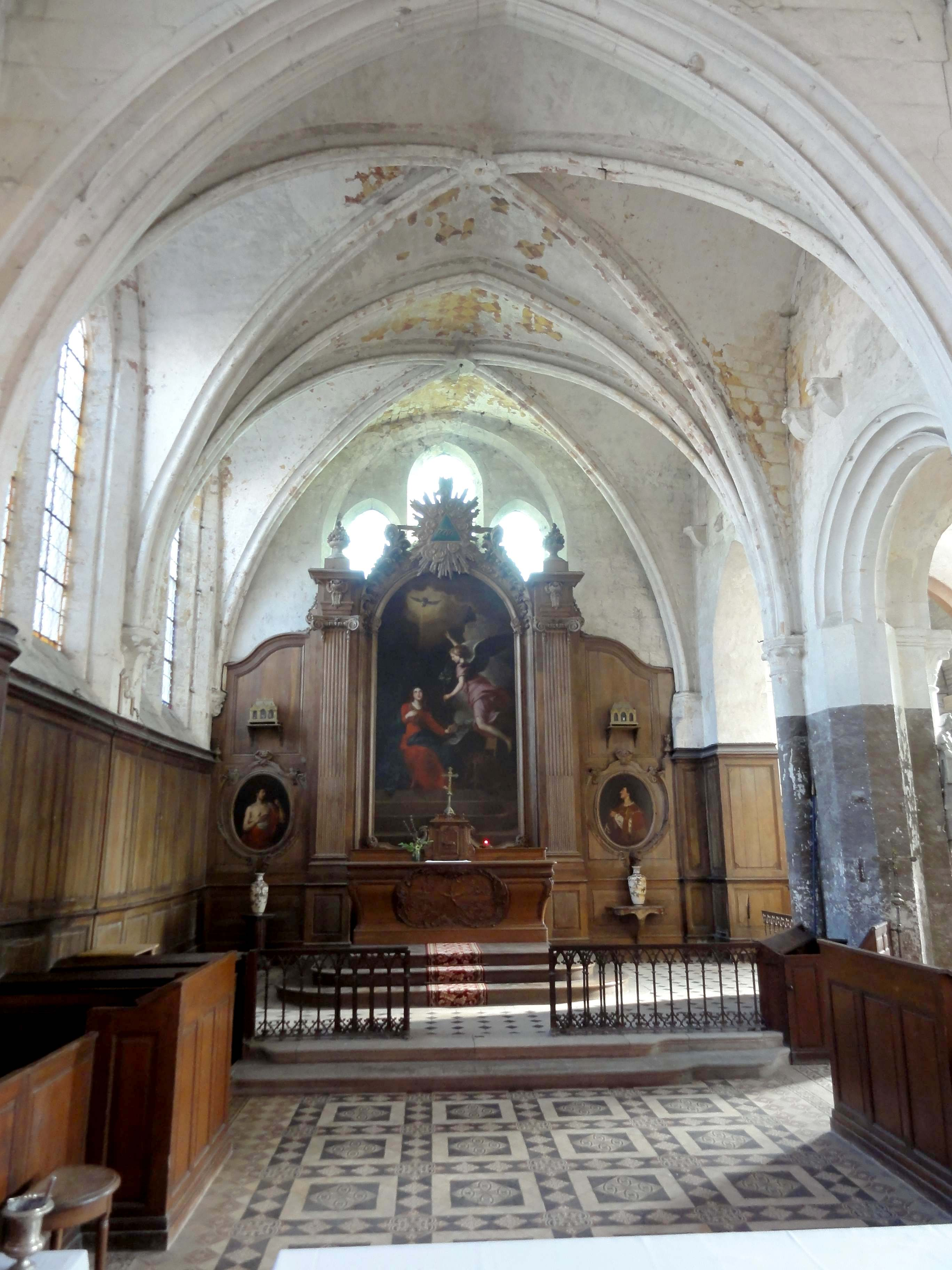 Intérieur de l'église - voir titre.